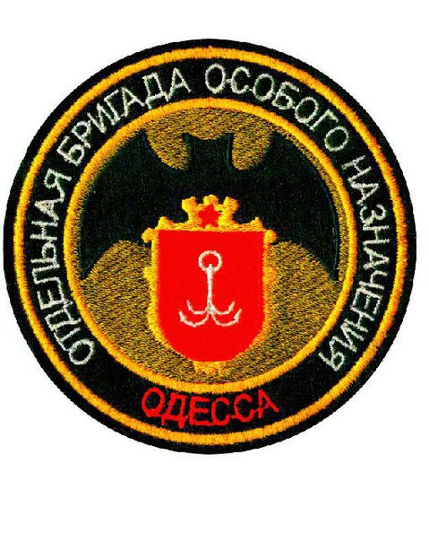 Шеврон отдельной бригады особого назначения "Одесса"